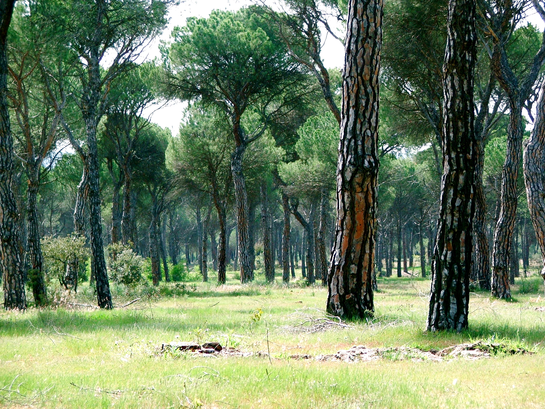 Imagen de un pinar en Tudela de Duero (España)